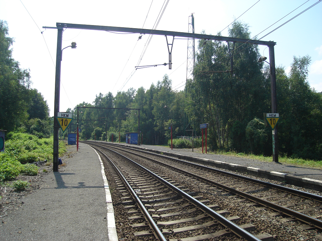 Point d'arrêt de Hourpes sur la ligne 130A.